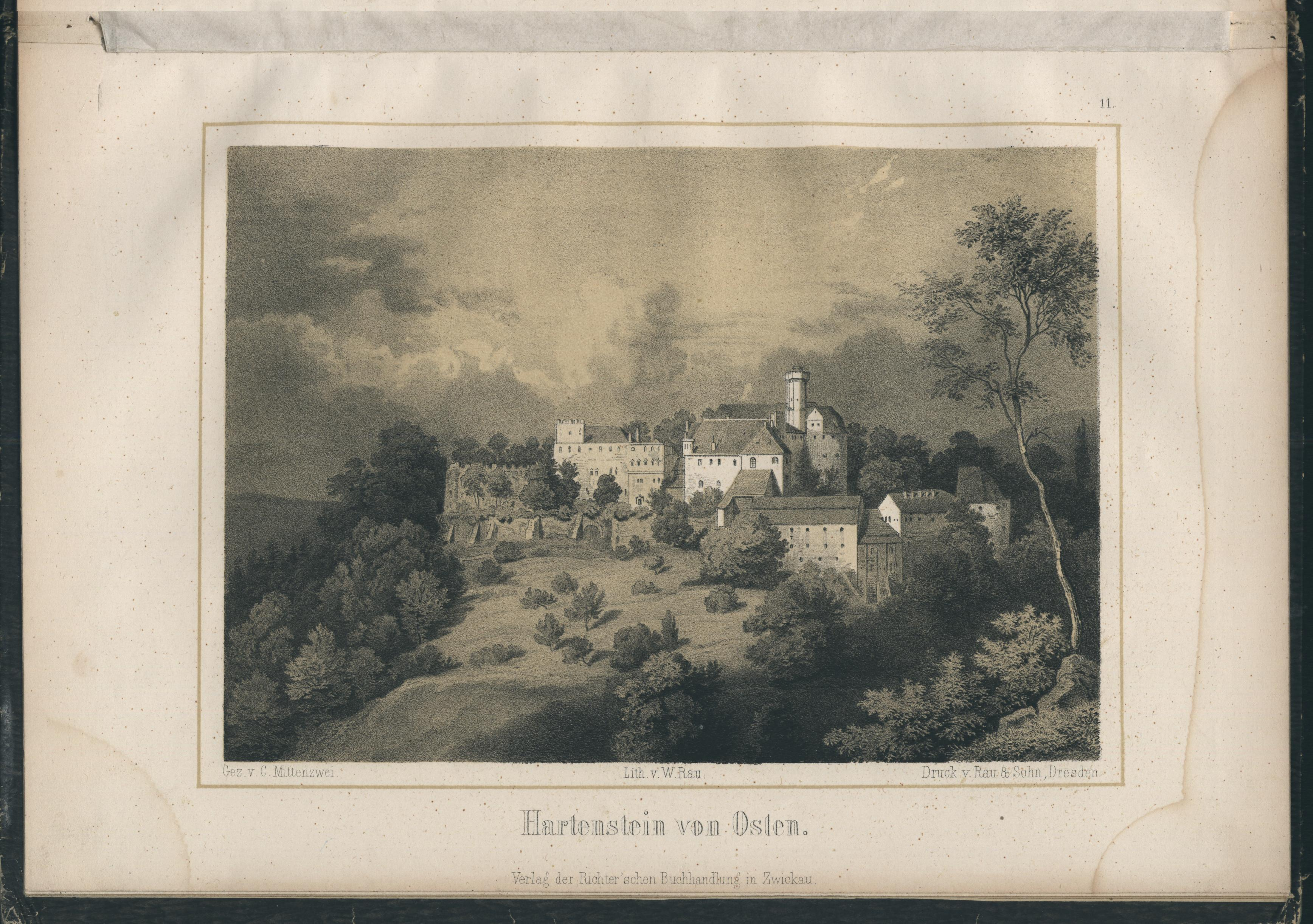 Seite aus: Album der Obererzgebirgischen Staats-Eisenbahn